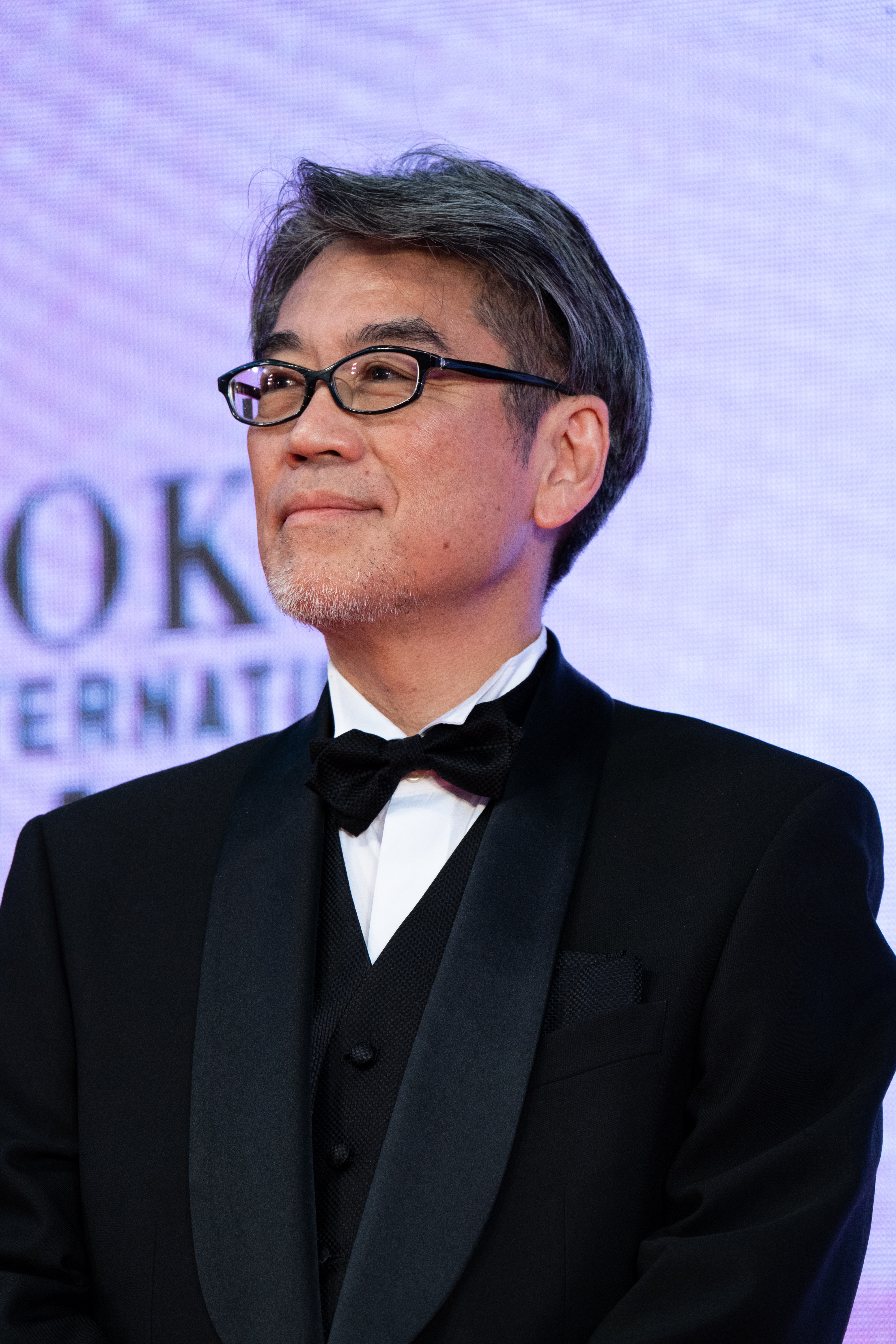 第32回 東京国際映画祭 オープニングセレモニー 井上伸一郎 (ジャパニーズ・アニメーション「THE EVOLUTION OF JAPANESE ANIMATION/VFX」)